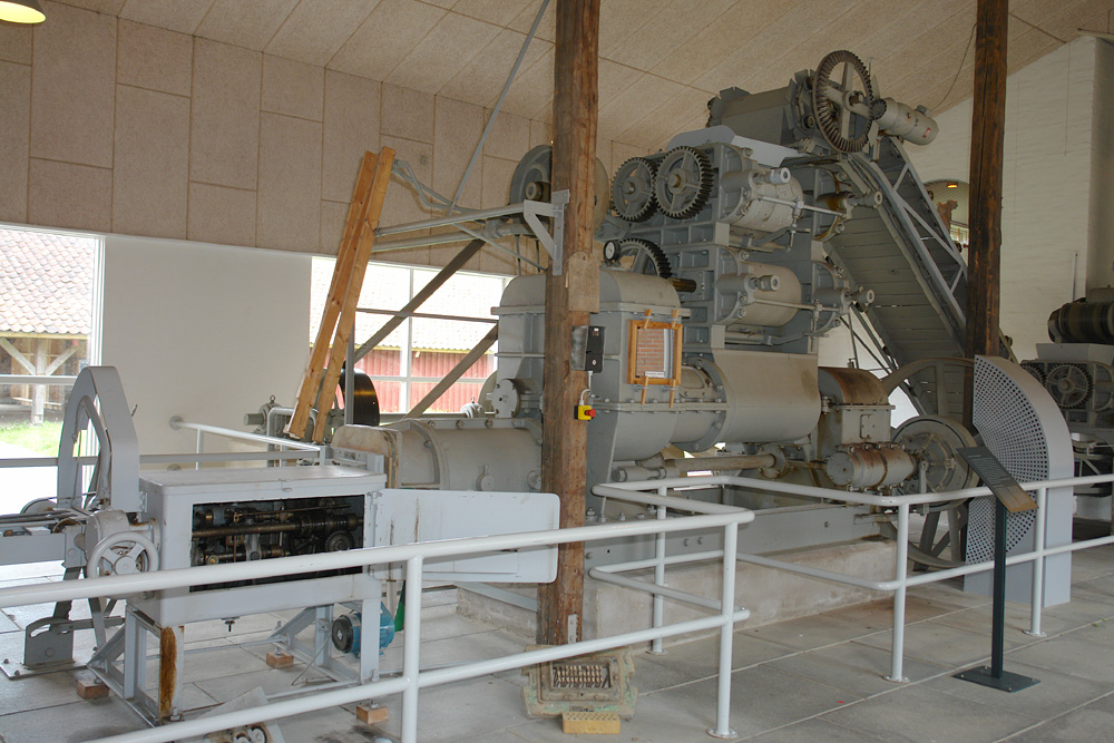 Cathrinesminde Teglvaerk an der Flensburger Förde. Als Ziegelei gegründet 1732, stillgelegt 1968. 1986 bis 1993 restauriert, heute Ziegeleimuseum